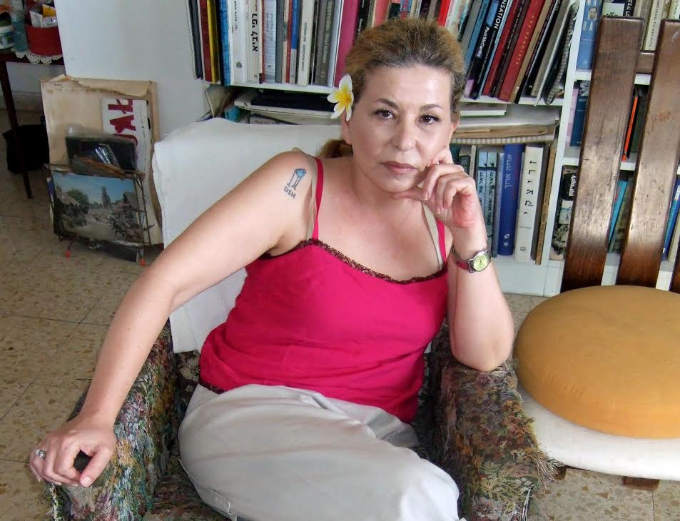 צילום של נעמי אביב